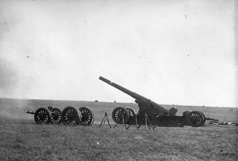 Zur kommenden grossen Abrüstungs-Conferenz am 2. Februar ! Werden sie das nun wirklich abrüsten ? ! Ein modernes französisches Schnellfeuergeschütz, deren Geschosse eine Reichweite von 80 km. haben. Auf besonderen Fahrvorrichtungen kann das Geschütz schnellen Stellungswechsel vornehmen. Information added by Wikimedia users.